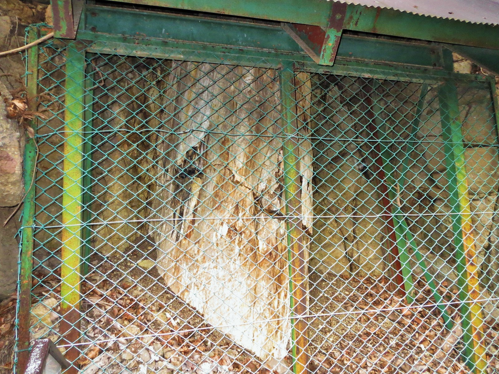 藤里の珪花木 Canon IXY 3